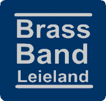 Logo Brass Band Leieland